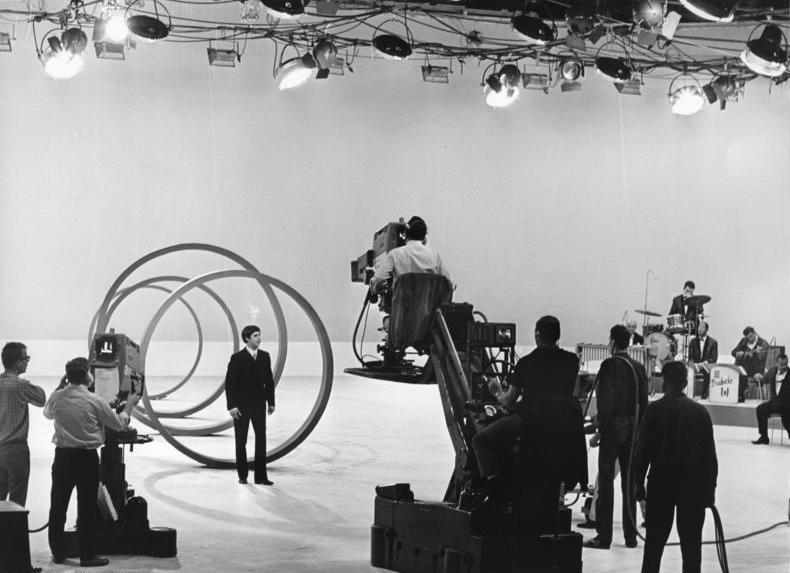 Berlin-West 25. Große Deutsche Funkaustellung 1967 in Berlin Proben zur Farbfernsehveranstaltung. "Show ist Show" aus der Deutschlandhalle